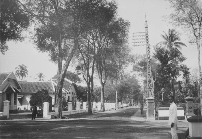 foto. Huizen aan de Van Lennepstraat, met aan de overzijde de telefoonpaal van het telefoonkantoor en een brievenbus